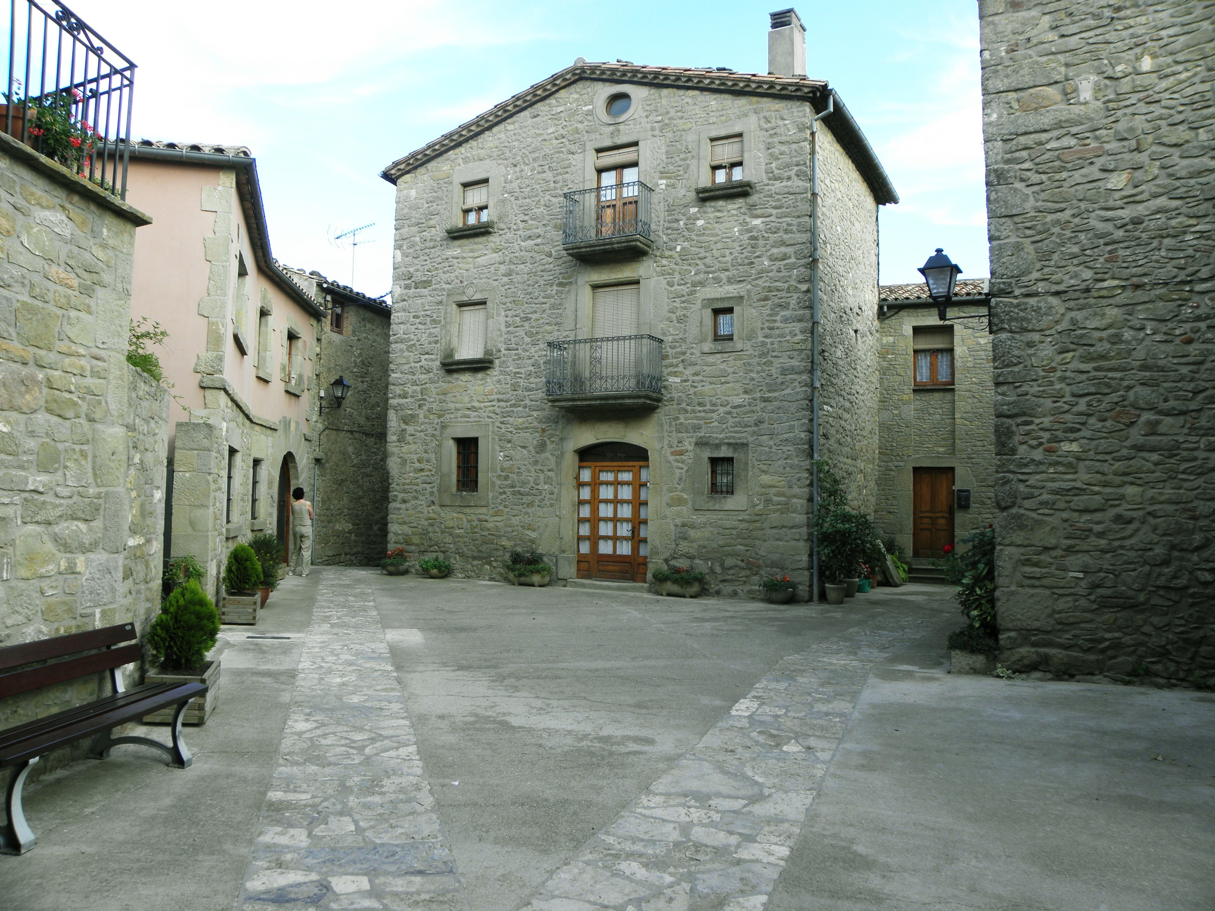 La plaça major de Prades de la Molsosa (La Molsosa, Solsonès) vista des del costat nord.